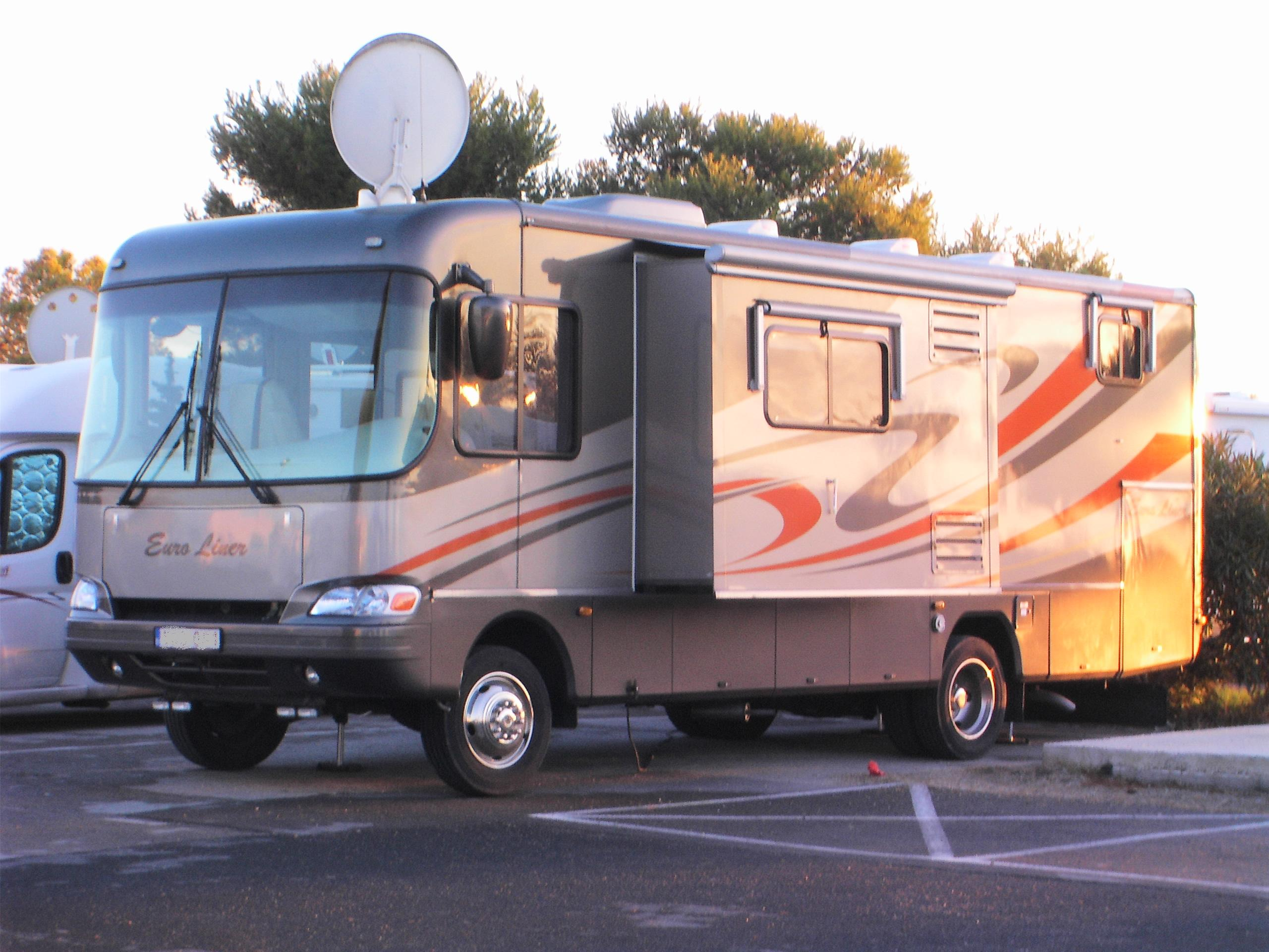 Camping car de type bus avec un élargissement possible à l'arrêt. Prise de vue dans le sud est de la France.